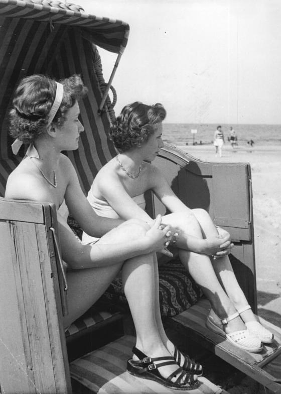 Zentralbild-Schwadten Wjt-Ho 14 Motive 2.7.1955 Urlaub am Ostseestrand. Aus allen Teilen der Deutschen Demokratischen Republik sind die Urlauber in die Ostseebäder der Halbinsel Darß, der Inseln Rügen und Usedom eingezogen. Für zwei oder drei Wochen sind See, Sonne, Wind, Wellen und weisser Strand nur zur Freude der nur zur Freude der Erholungssuchenden da. UBz: Die Sonnenhungrigen.